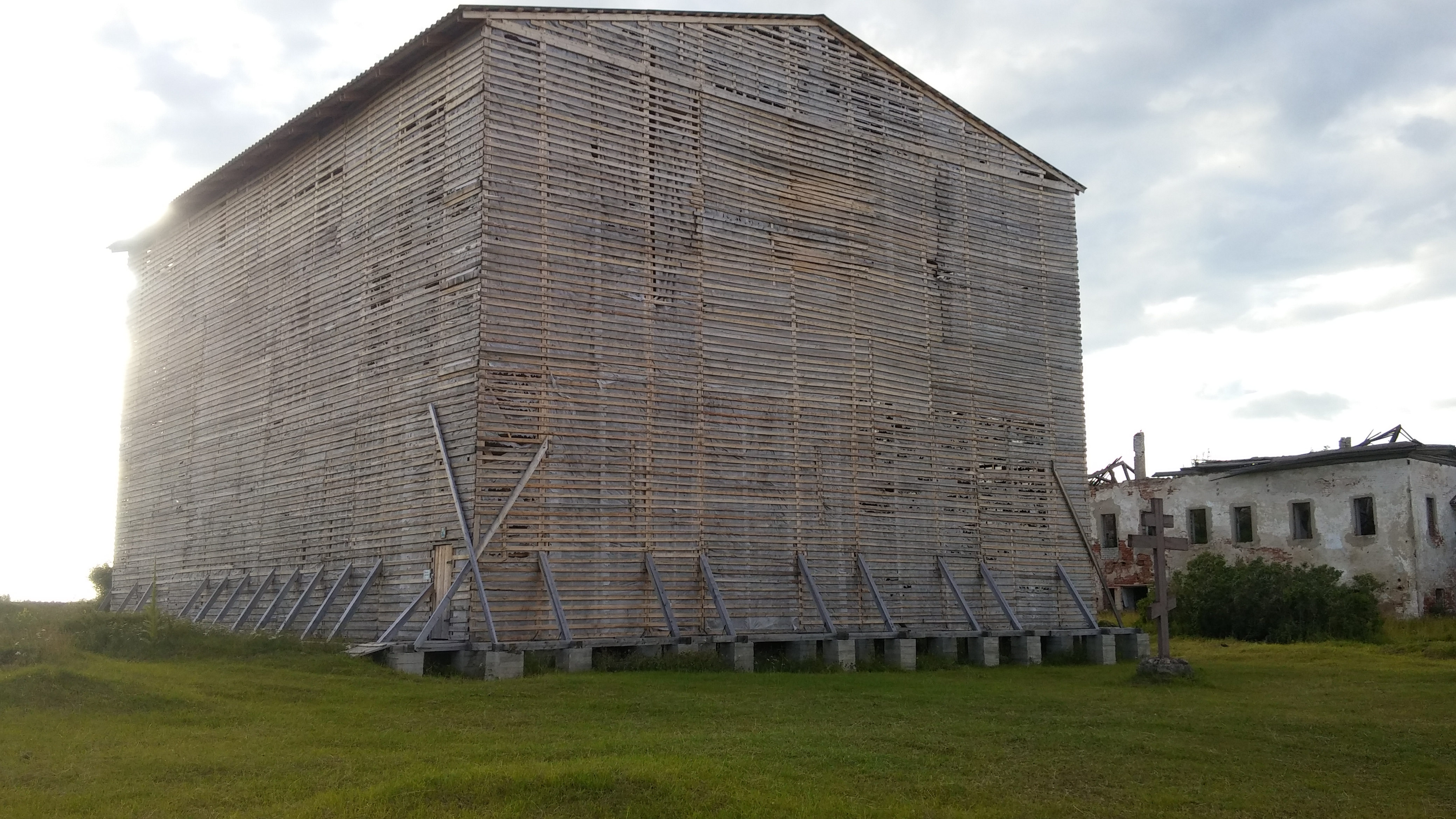 Краснохолмский Антониев монастырь, Никольский собор